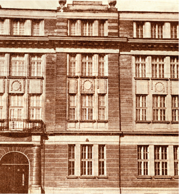 Сградата на Свободния университет на ул. Раковска 94